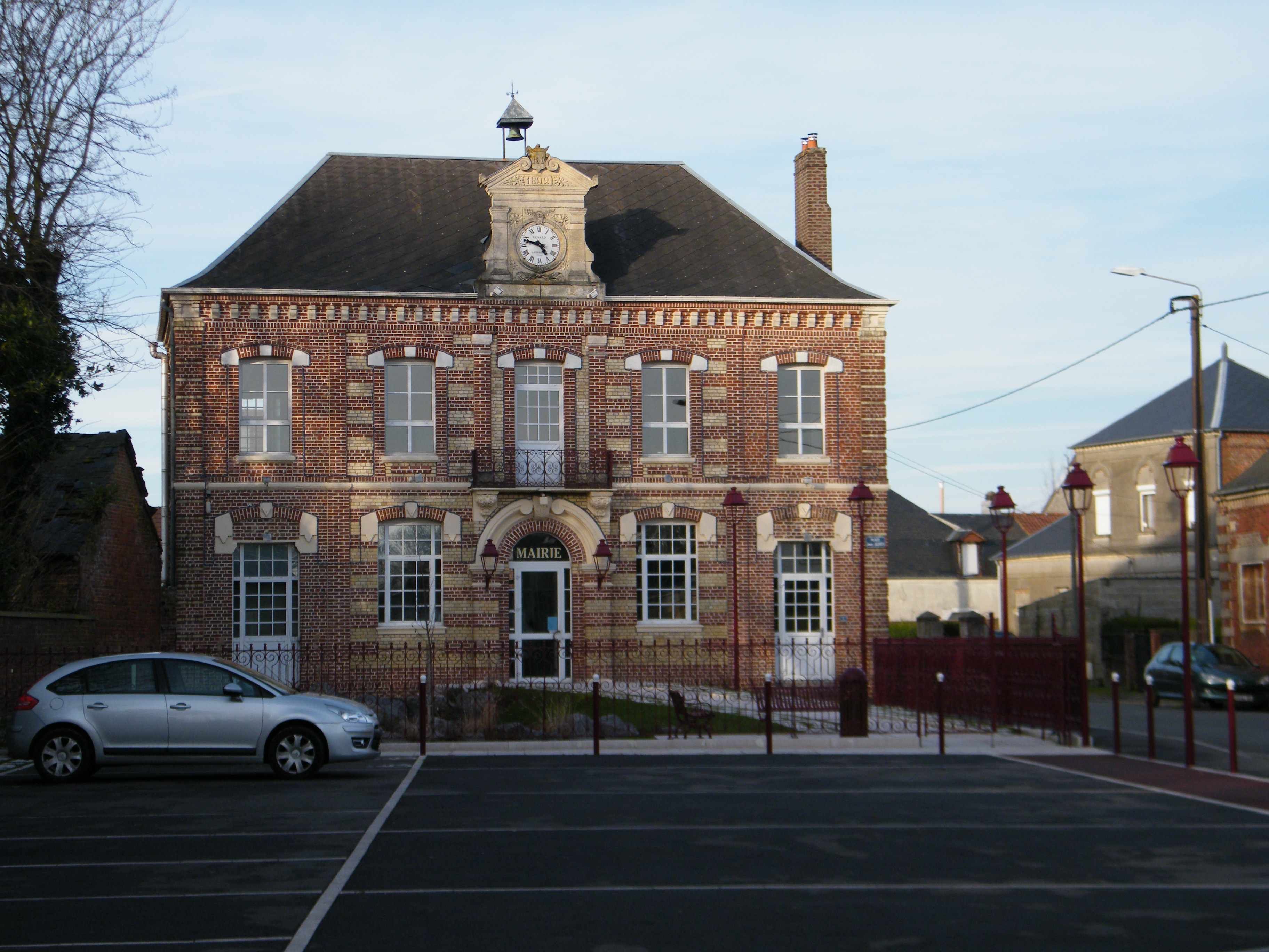 Près de l'église, la mairie.